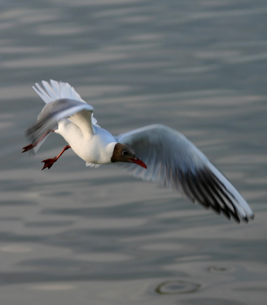 Repülő dankasirály Fertőrákoson